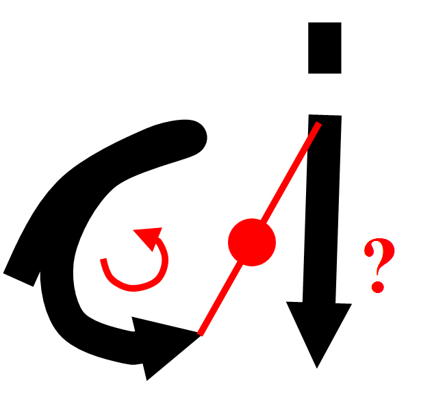 Bewegungsunterbrechung zwische bogen- und linienzügigen Elementen Na Vosa Vakaviti: Interrupt between curbed and linear elements